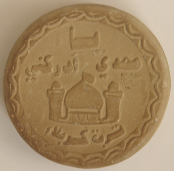 Turbah